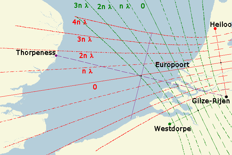 kaartje decca E2 chain (zelf gemaakt)